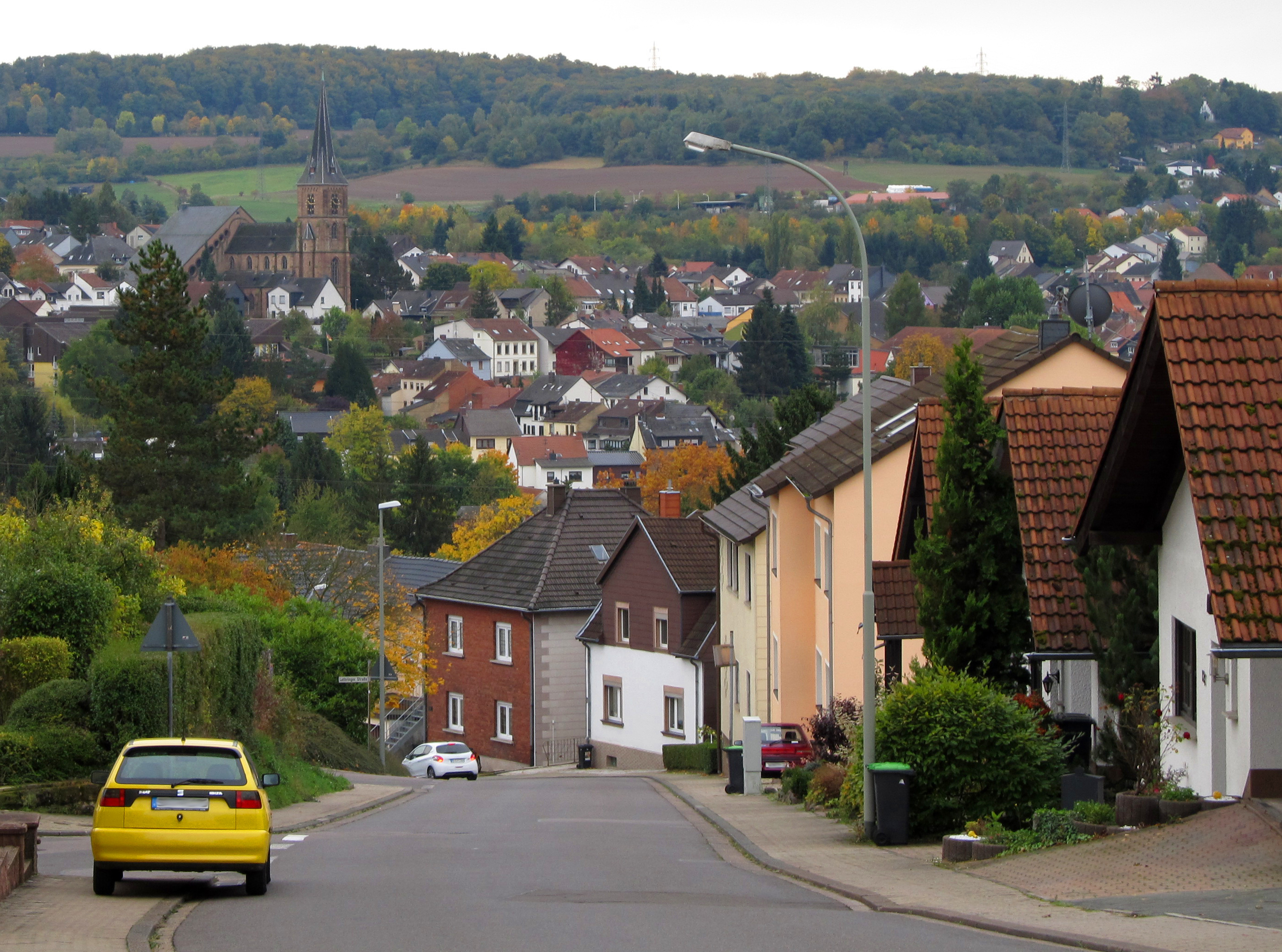 Ansicht von Püttlingen, Saarland